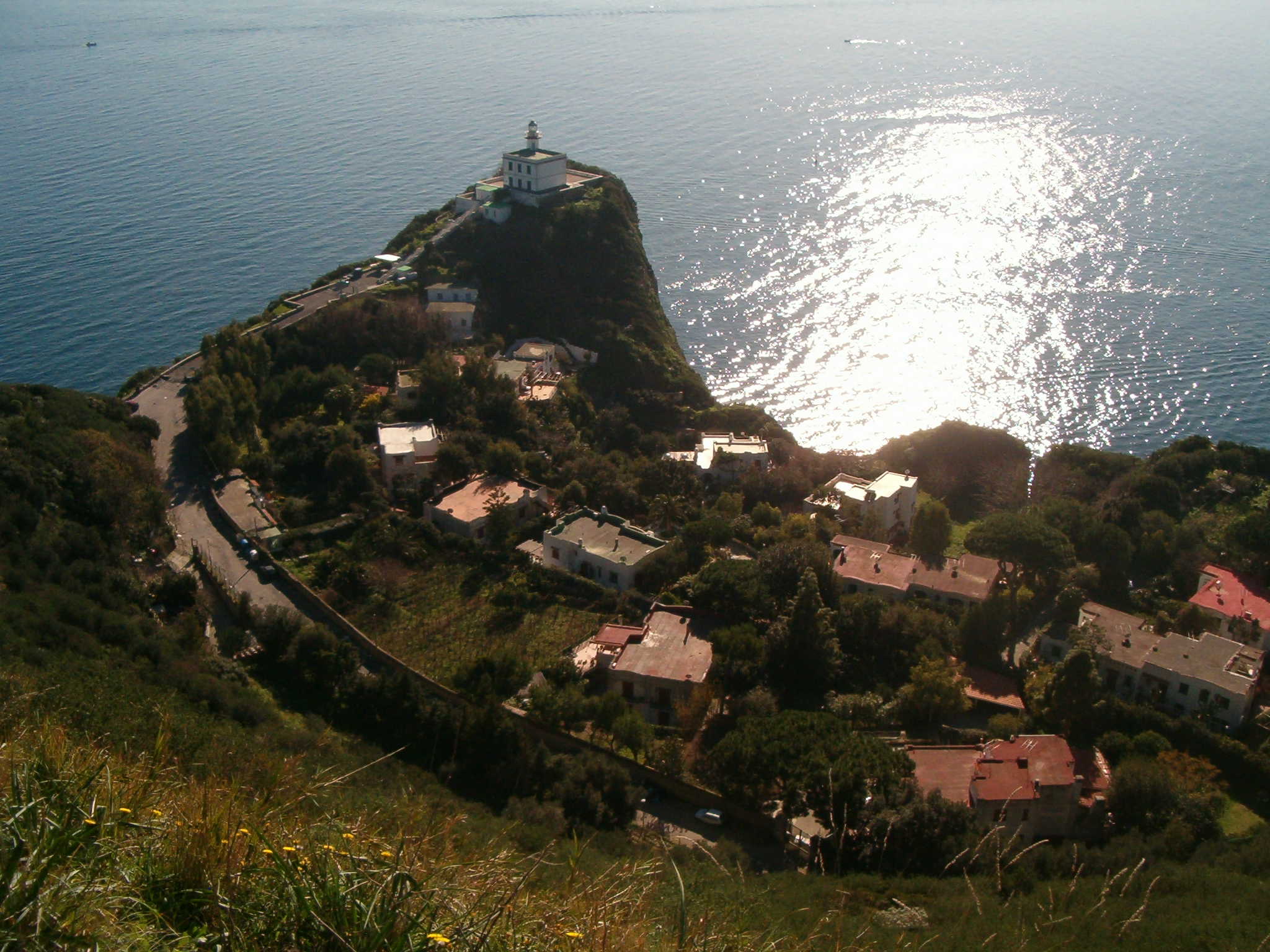 Comuna de Bacoli, Cabo Miseno, vista del faro y de los chalets.